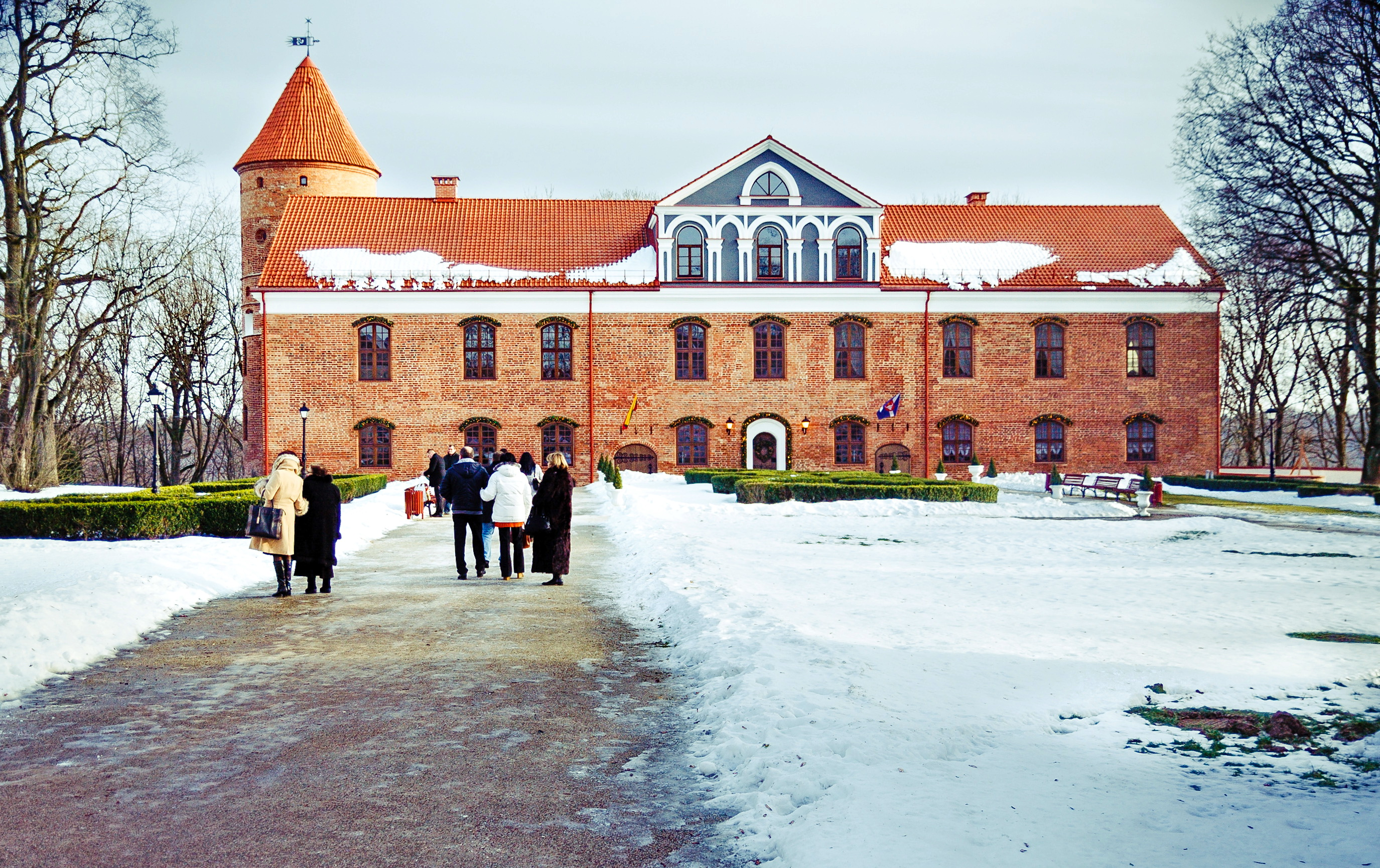 Raudondvario rūmai